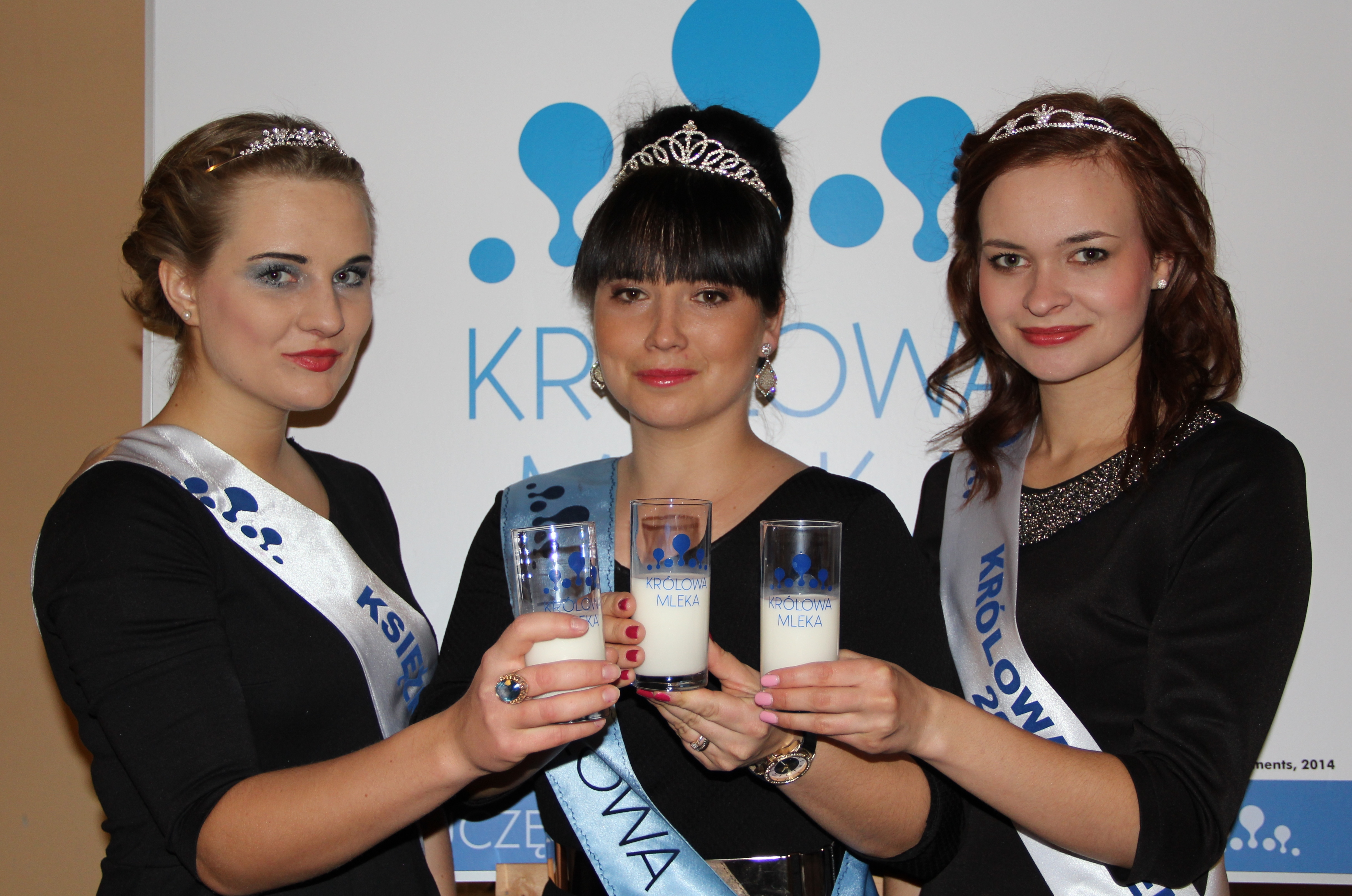 Polnische Milchhoheiten: Karolina Bukowska (Milchprinzessin 2015), Katarzyna Gajownik (Milchkönigin 2014) und Justyna Matusiewicz (Milchkönigin 2015)